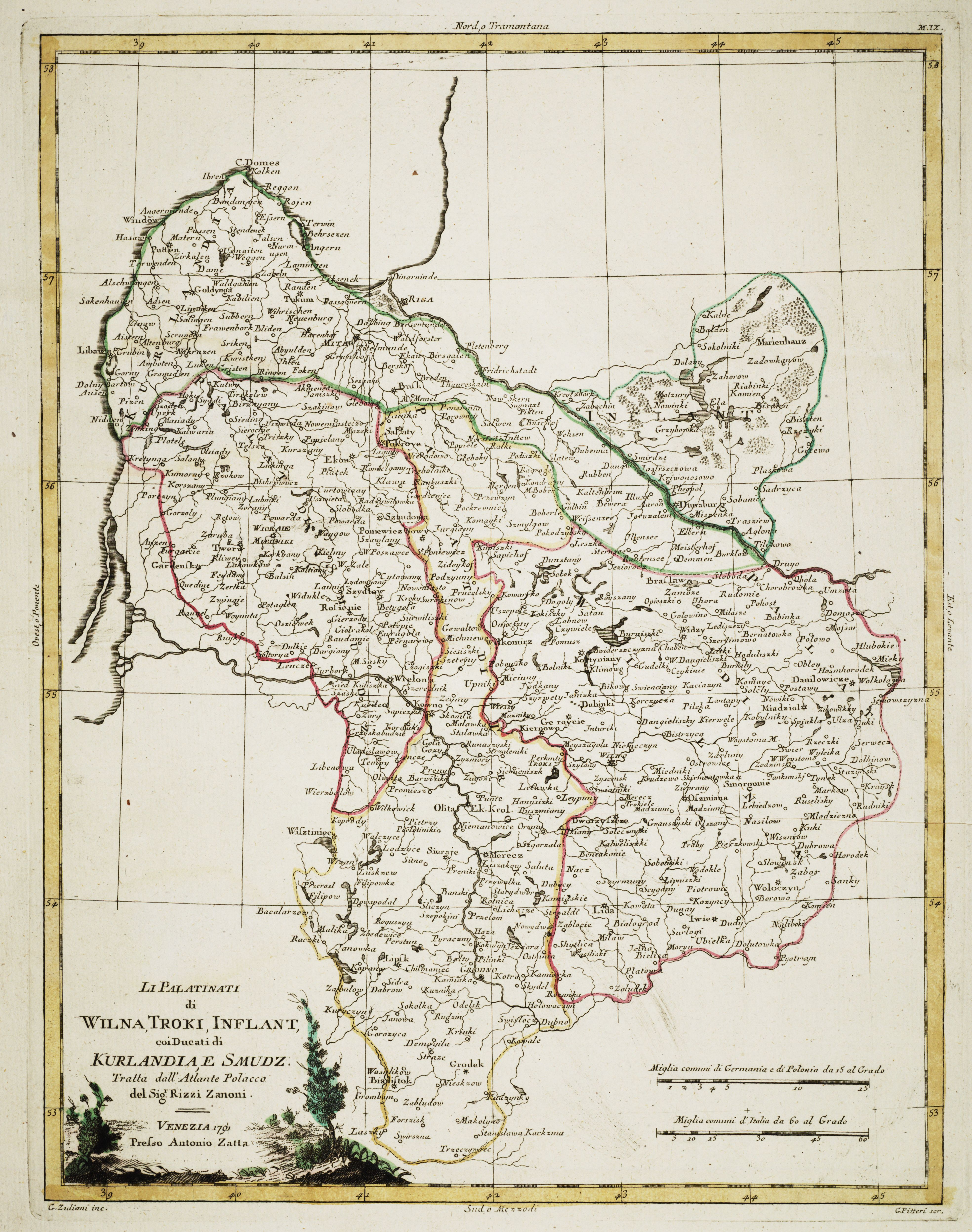 Беларуская (тарашкевіца): Мапа Віленскага, Троцкага і Інфлянцкага ваяводзтваў, Курляндыі і Жамойці